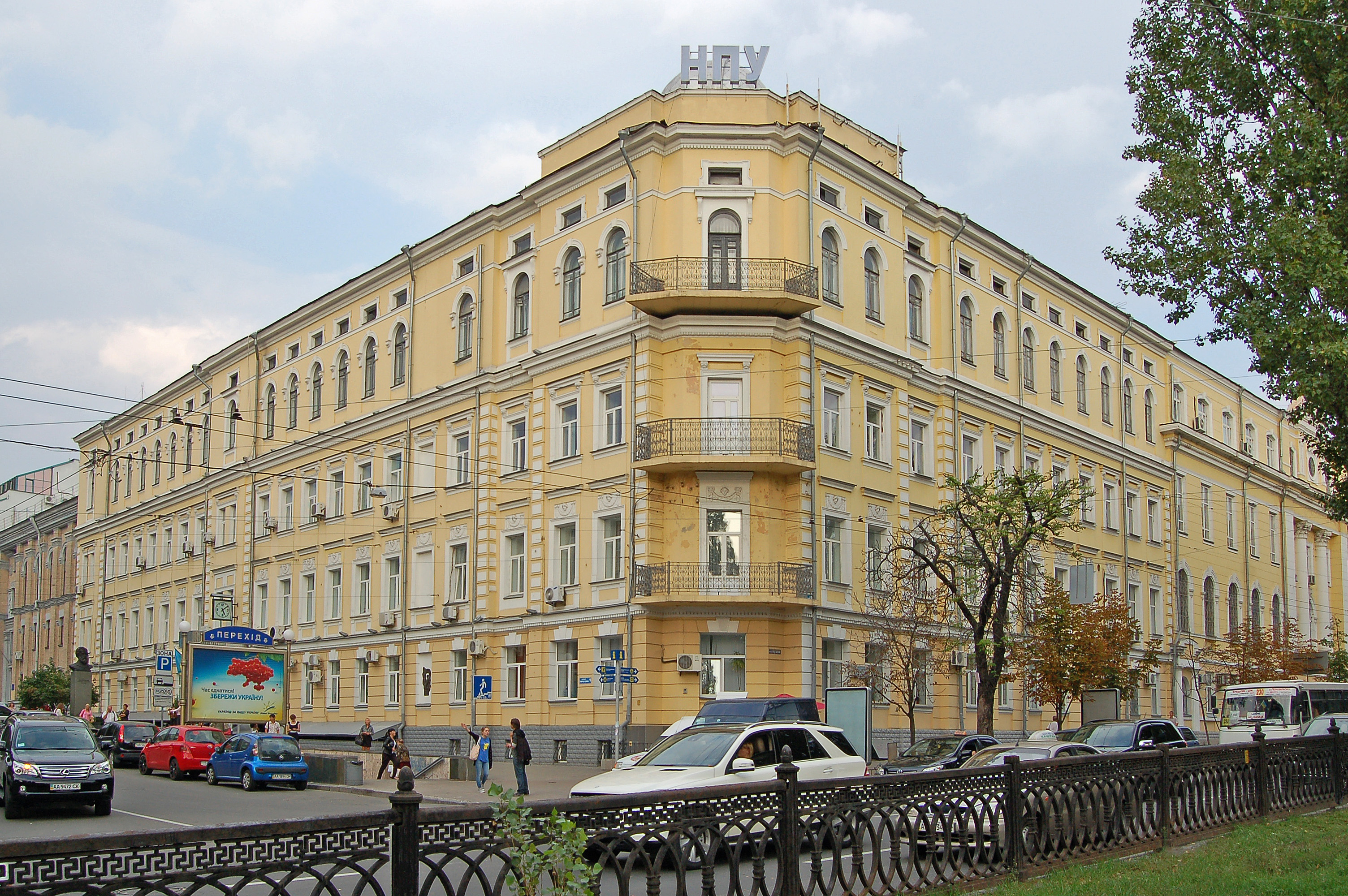 Дом № 22-24/9 по бульвару Тараса Шевченко в Киеве